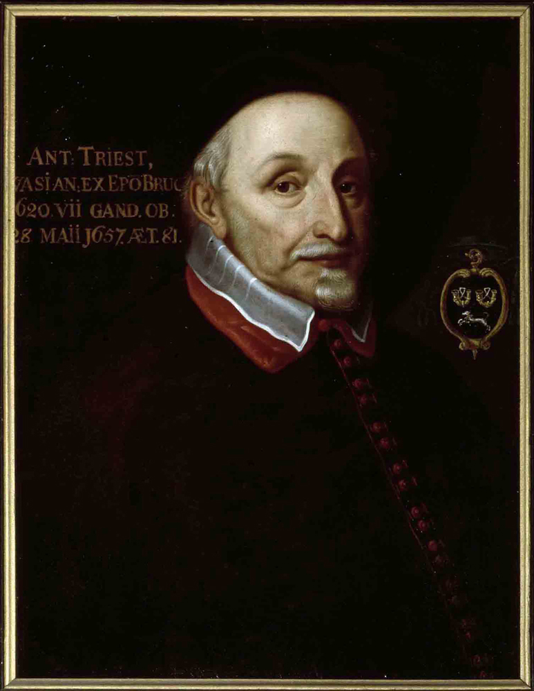 Sint-Baafskathedraal, Gent Portret van Mgr. Antonius Triest; inv nr: 499/7